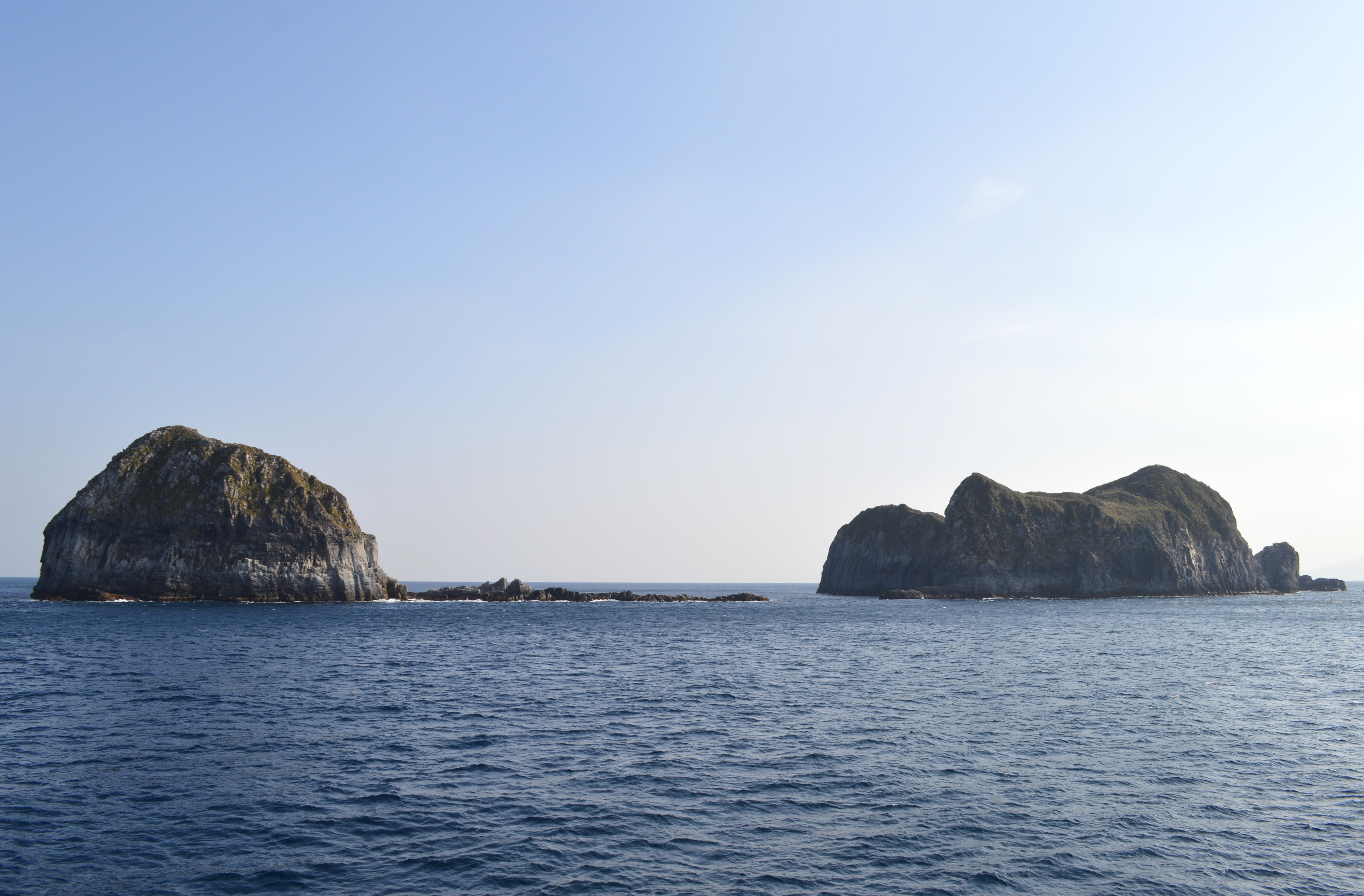 祇苗島 (海上より)